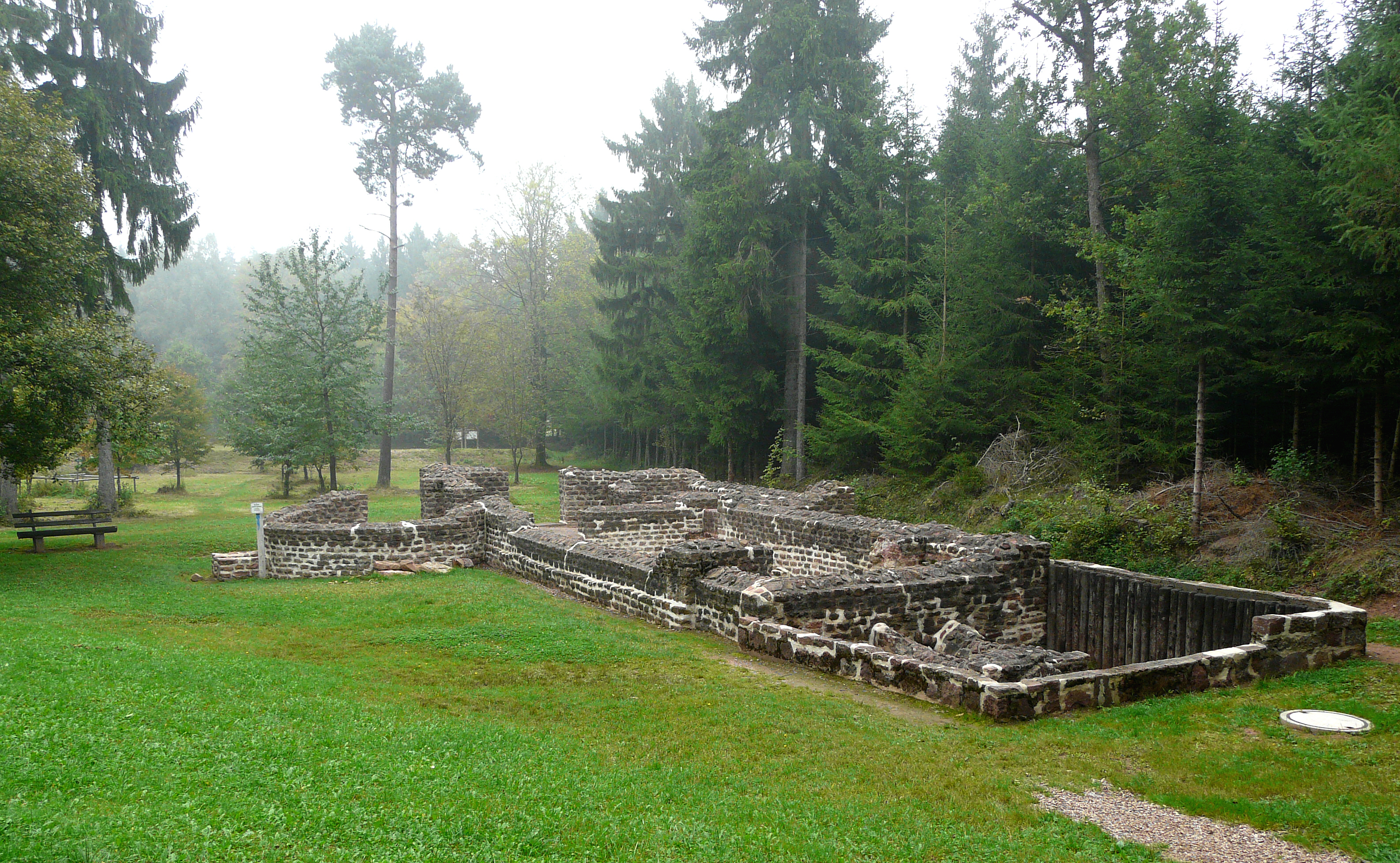 Thermen des Kastells Würzberg am Odenwaldlimes